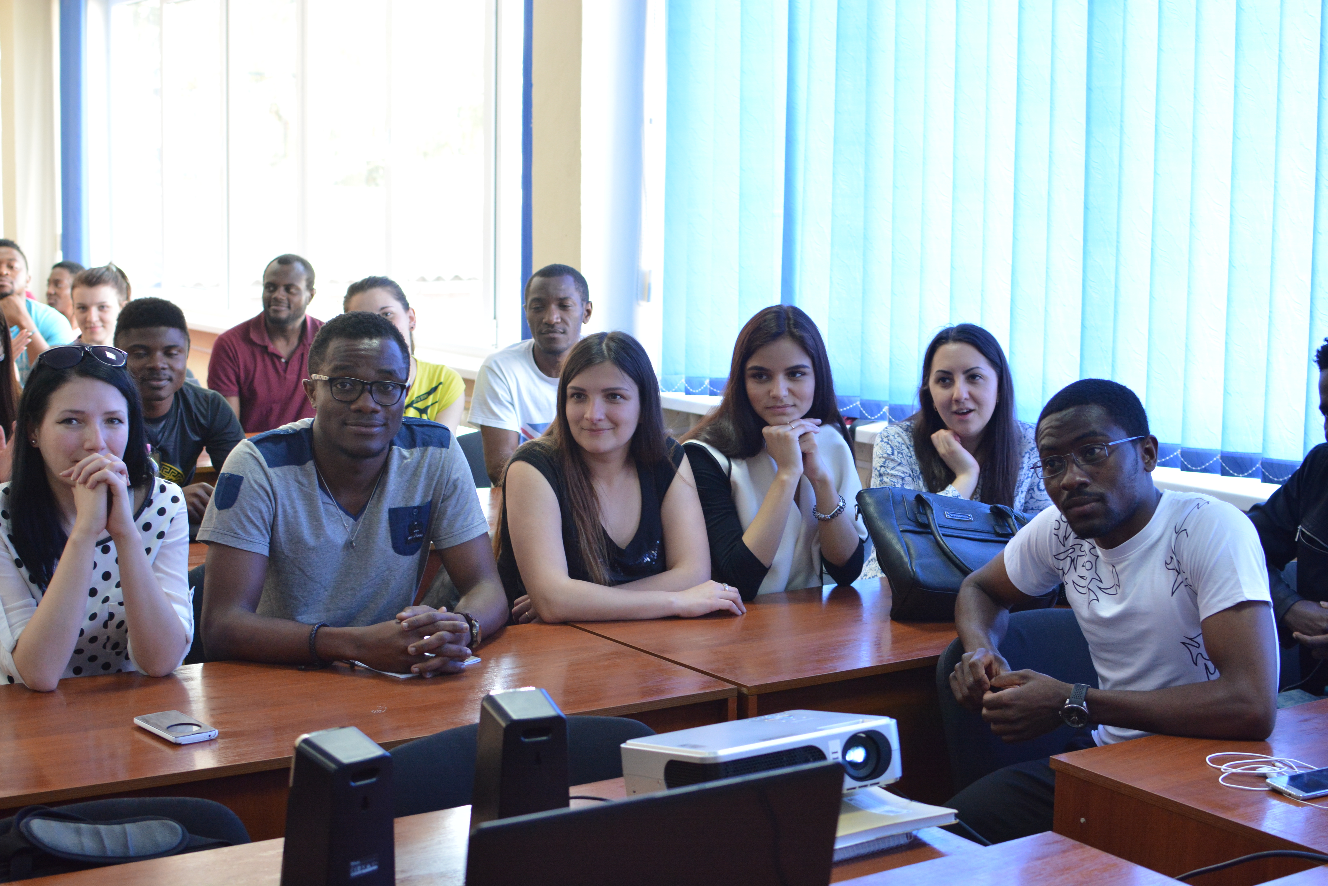 Іноземні студенти